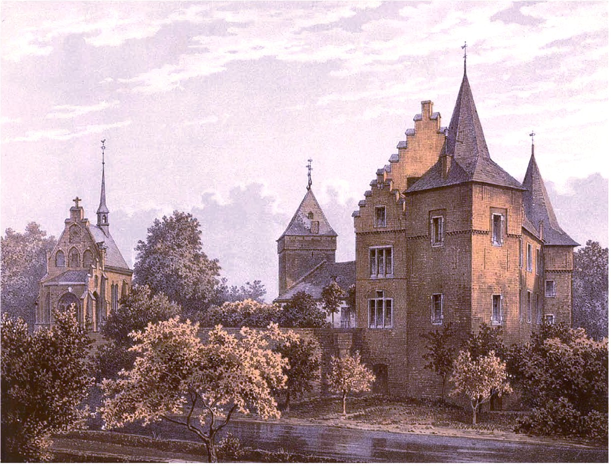 Burg Elsum in Wassenberg, Kreis Heinsberg, Rheinprovinz